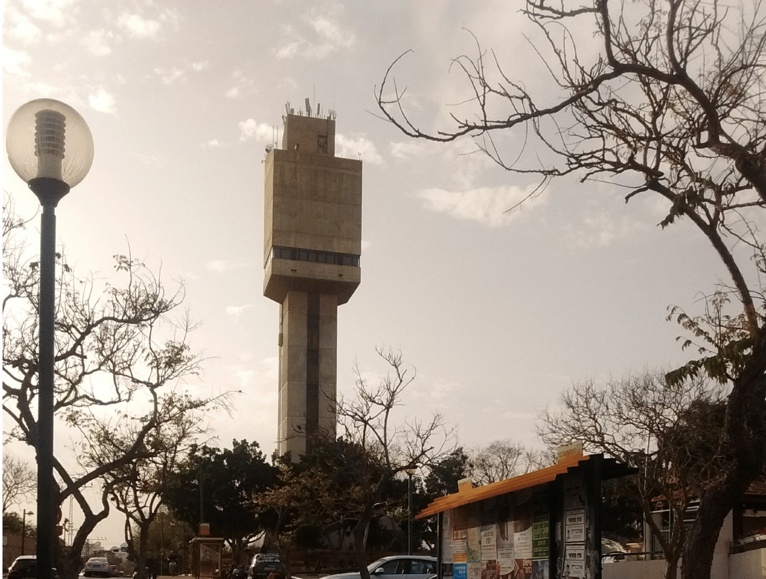 מגדל המים של כפר סבא בשנת 2016.